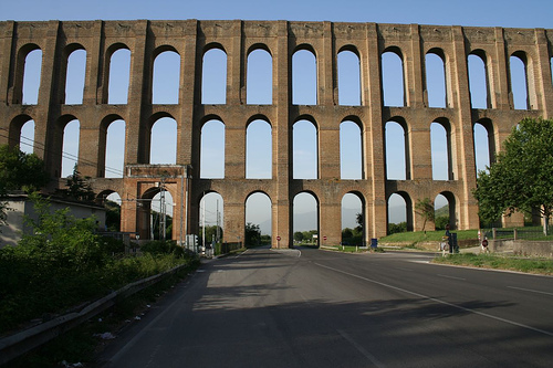 Vanvitelli-vizvezetek